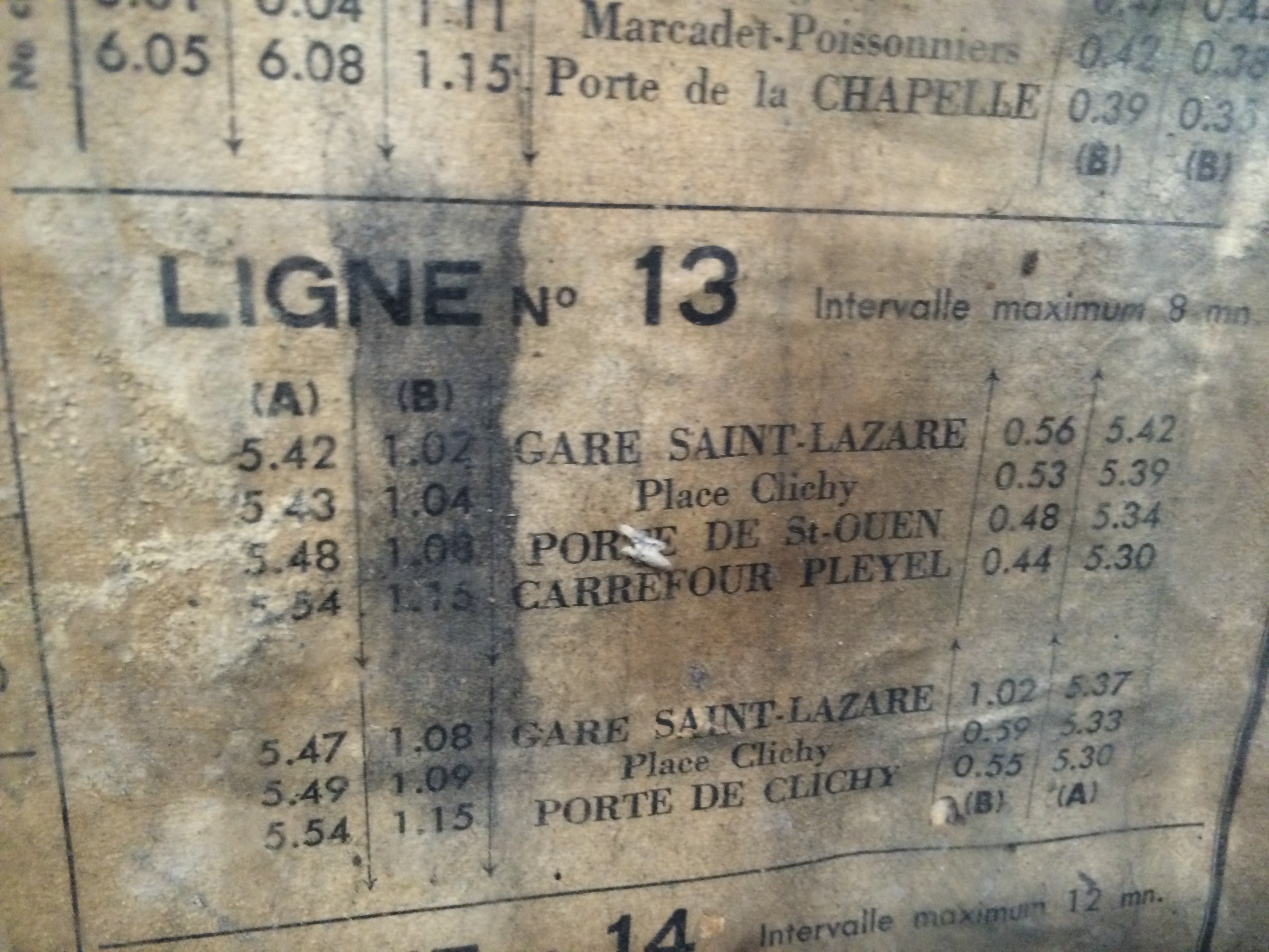 Sur les quais de la station de métro Trinité - d'Estienne d'Orves décarossée en 2016, une ancienne affiche (1957 ?) sur les horaires de la ligne 13